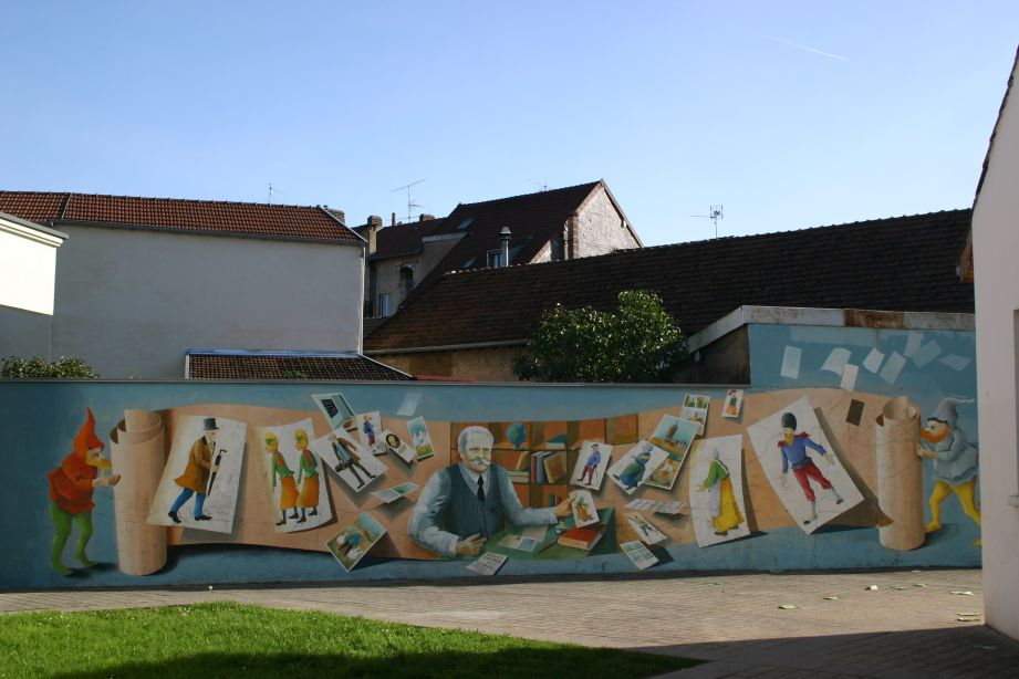 Mur peind en l'honneur de Georges Colomb dans la ville de Lure